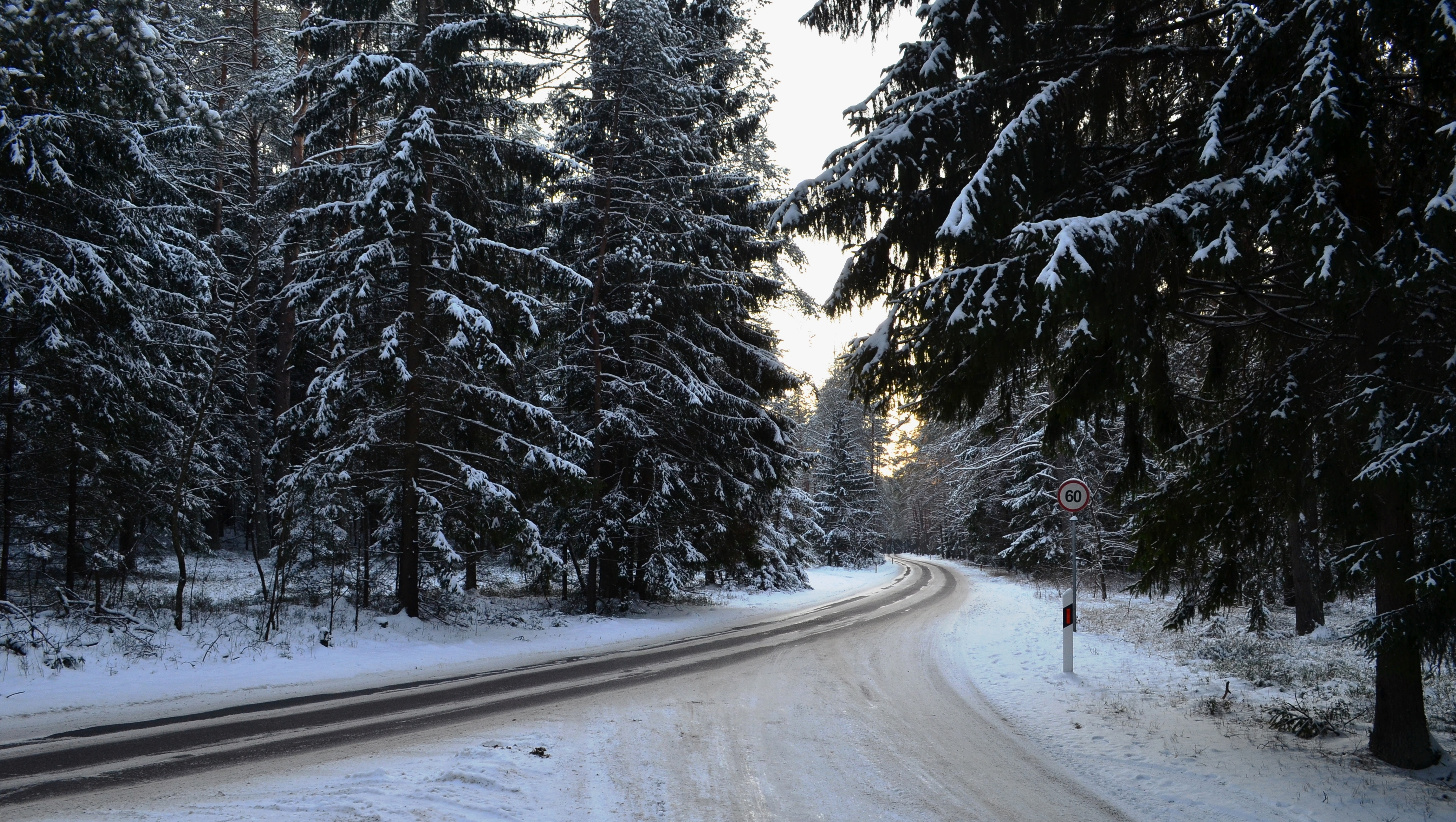 Nemenčinės-Lavoriškių miškas šalimais Tapelių žiemą, Vilnius